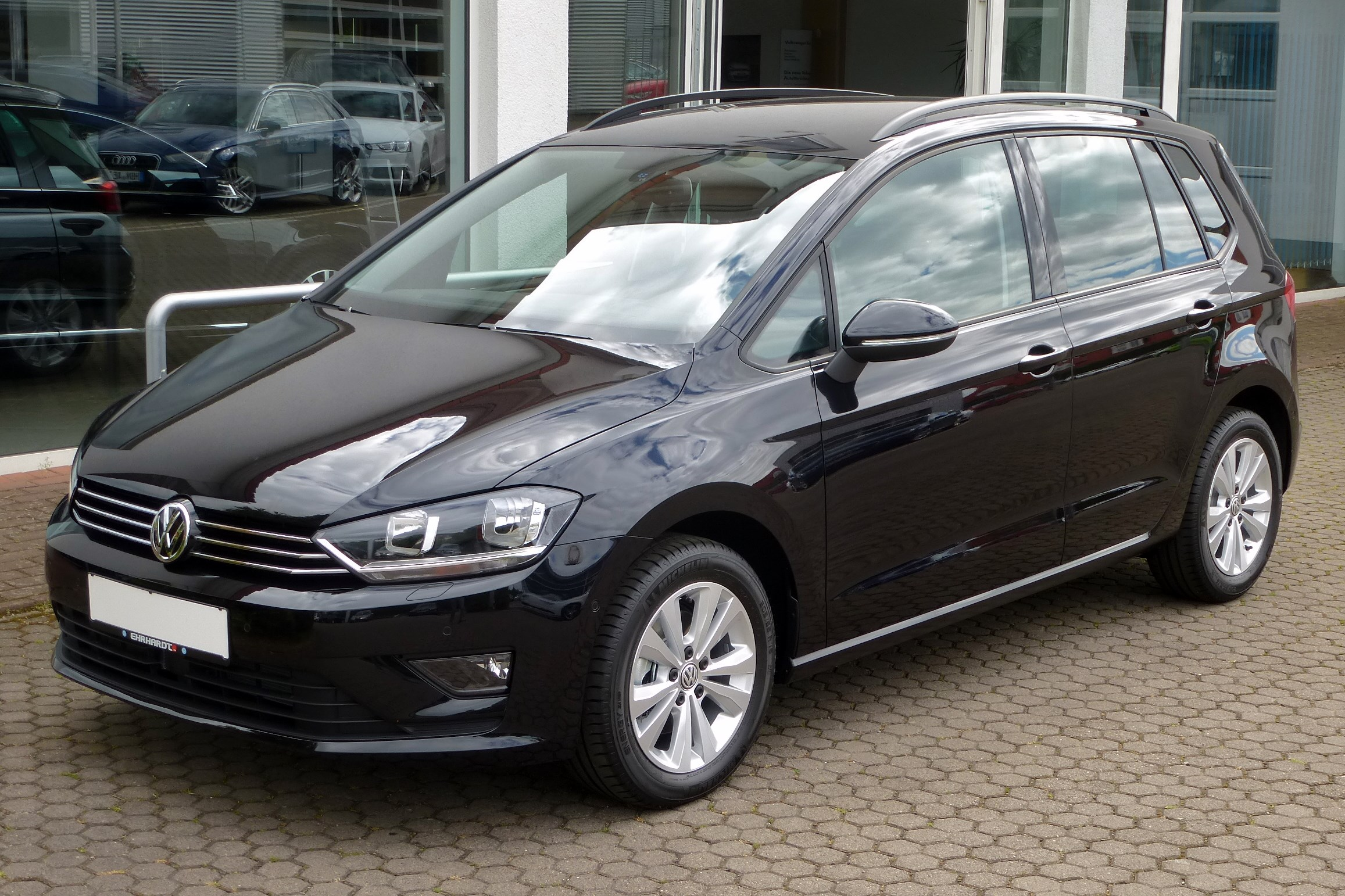 VW Golf Sportsvan